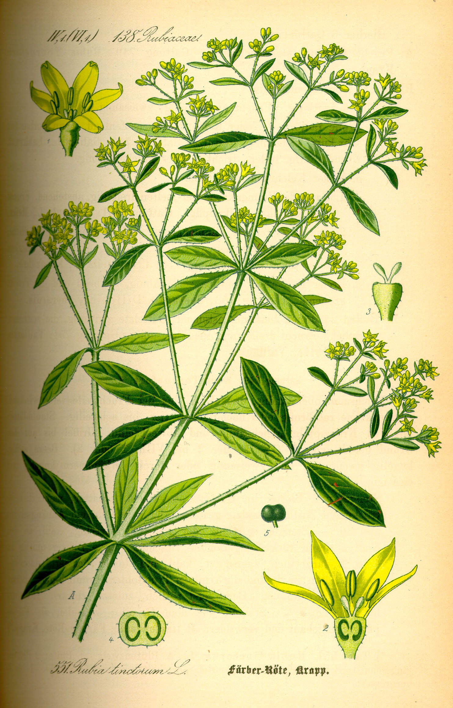 Rubia tinctorum L., syn. Galium rubia E.H.L.Krause